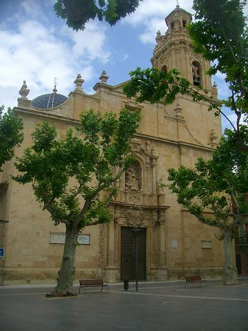 Fachada de la Basílica Ntra. Sra. del Socorro